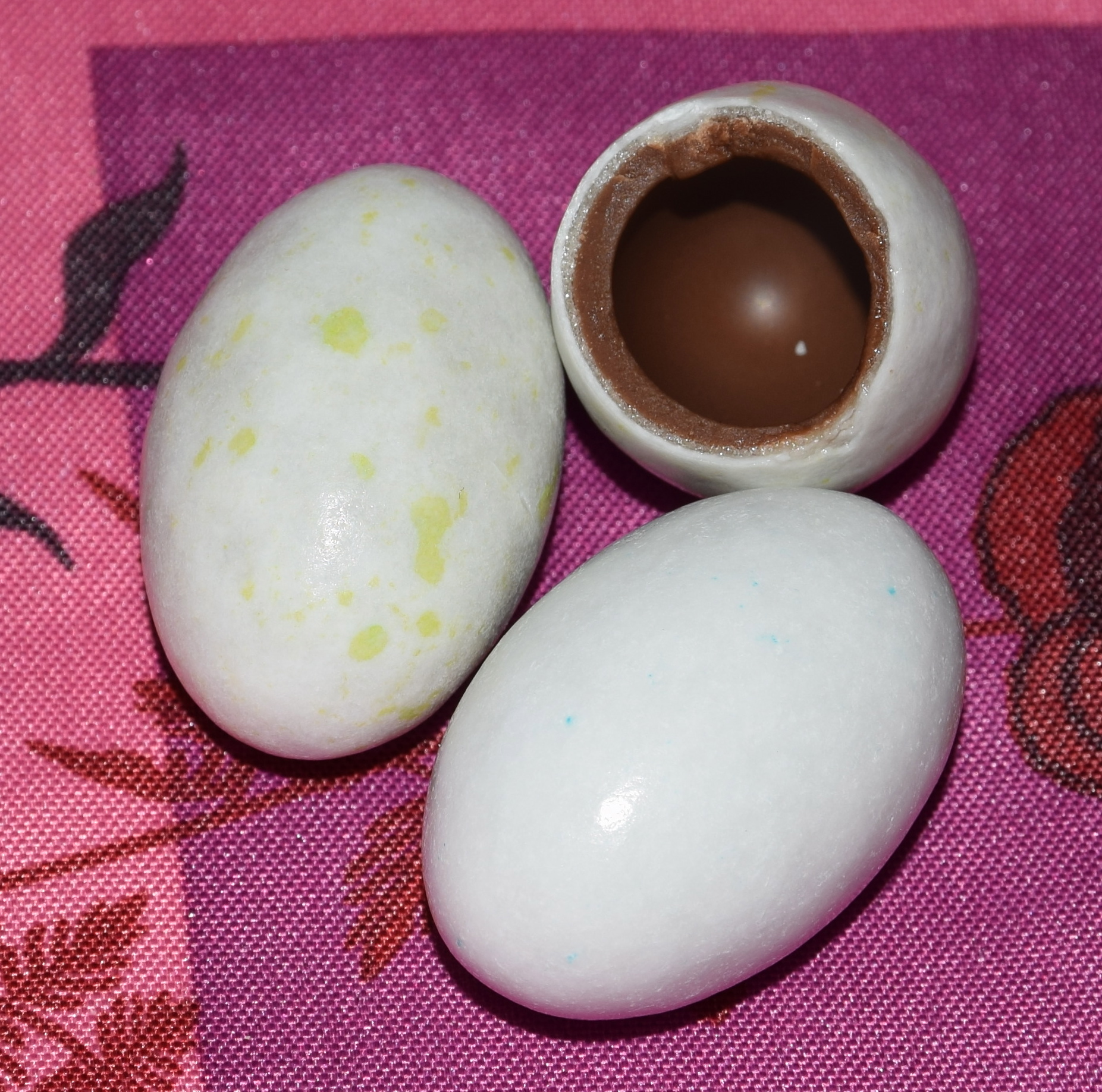 oeufs de mouette en chocolat